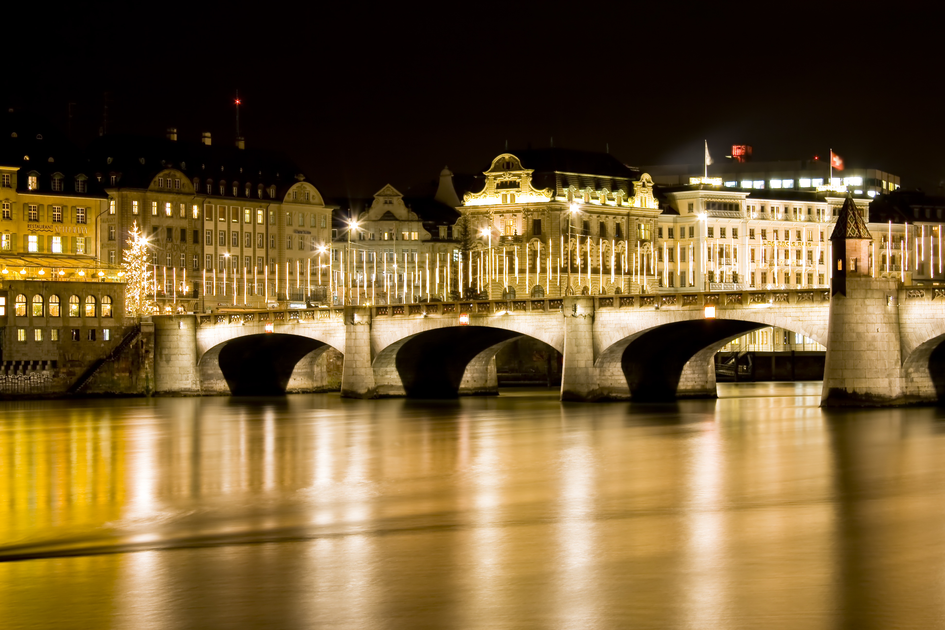 Basel